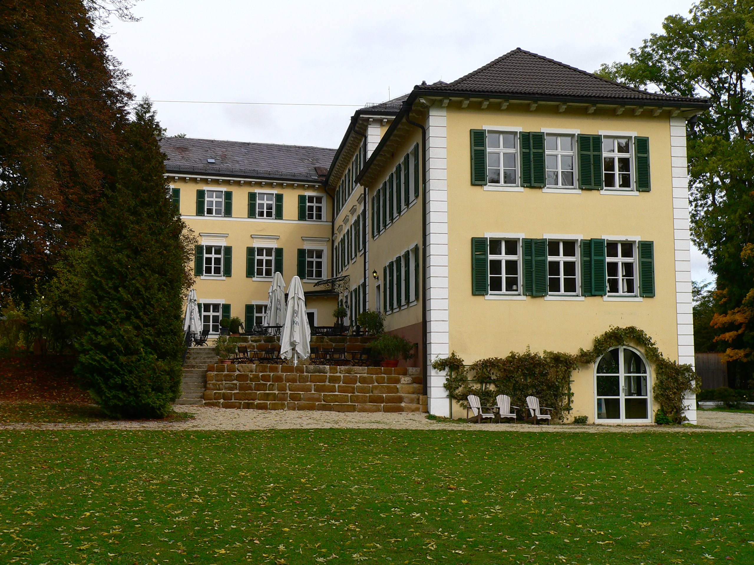 Schloss Burgellern in Scheßlitz-Burgellern, Bayern, Regierungsbezirk Oberfranken, Landkreis Bamberg